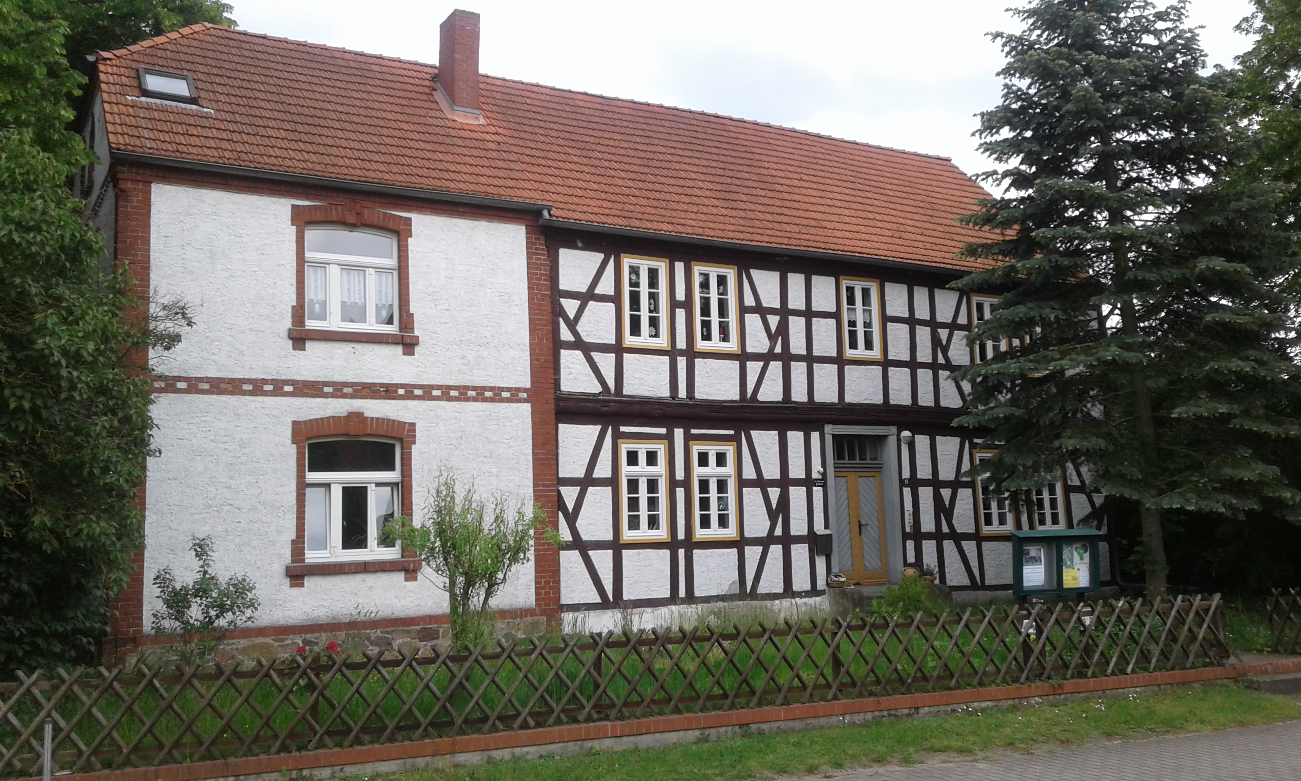 Pfarrhaus